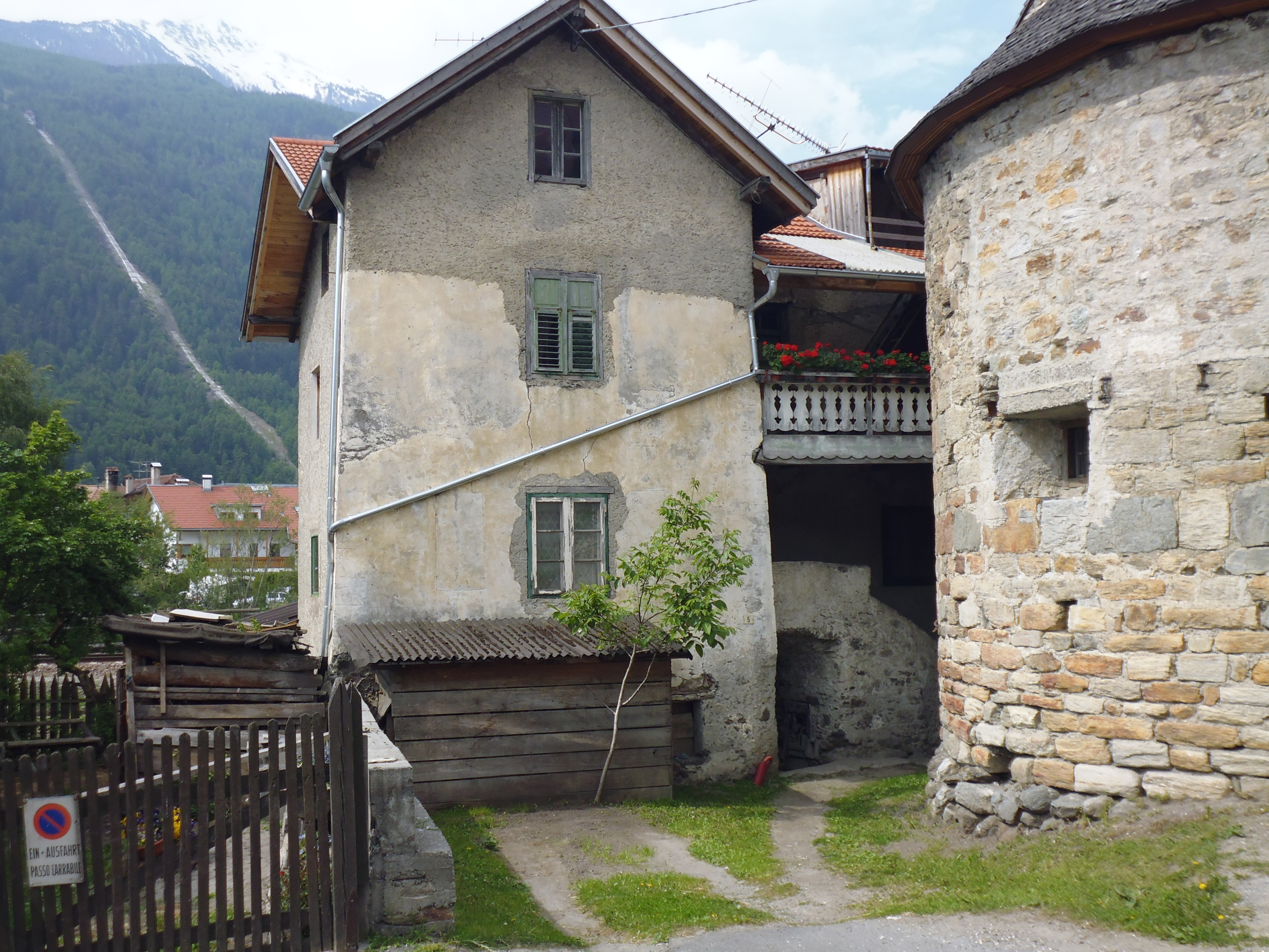 Alter Pfarrwieden neben der ehemaligen Kirche St. Marx in Laas, die rechts erkennbar ist, links im Hintergrund die Laaser Marmorbahn